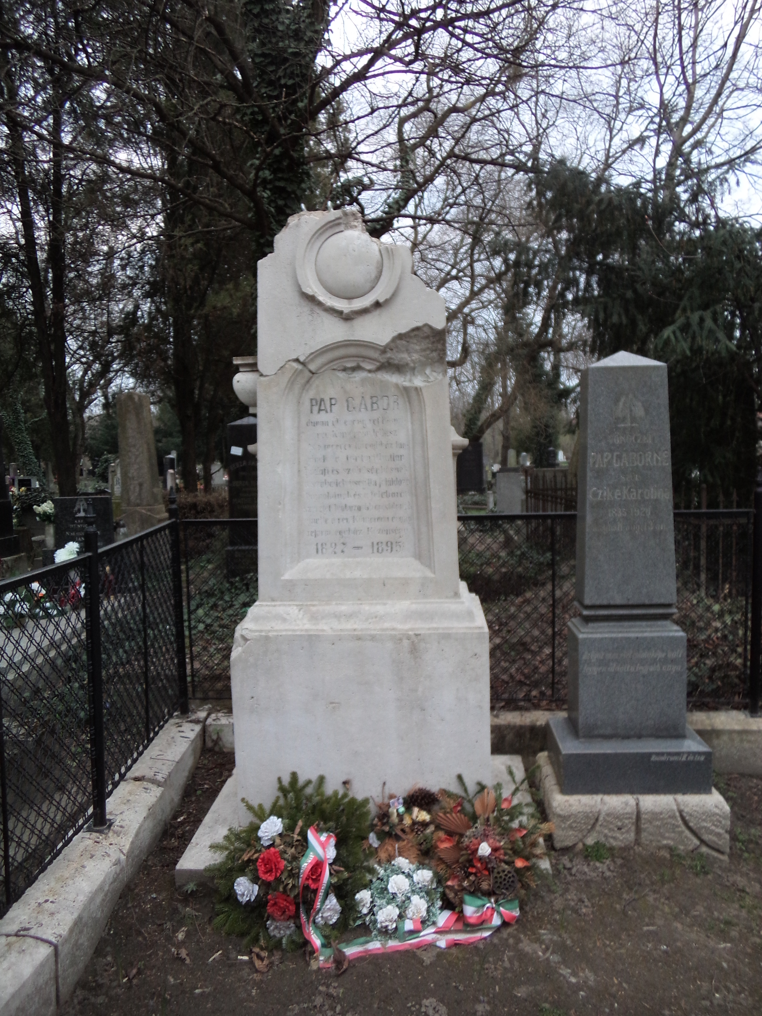 Pap Gábor - Komáromi temető